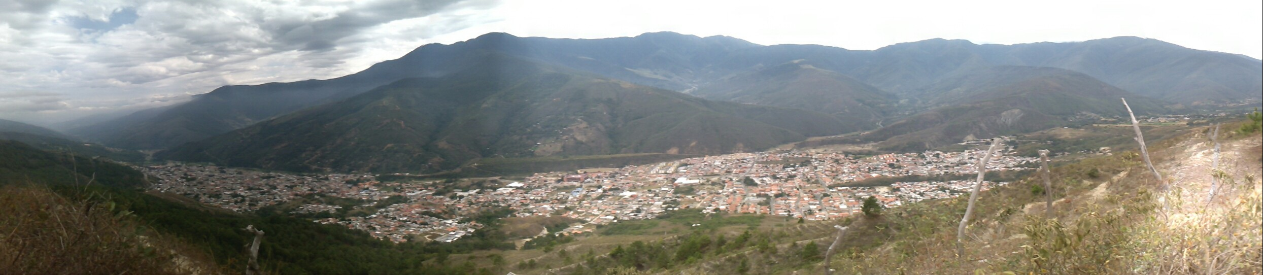 Vista de la ciudad des el páramo de Mariño